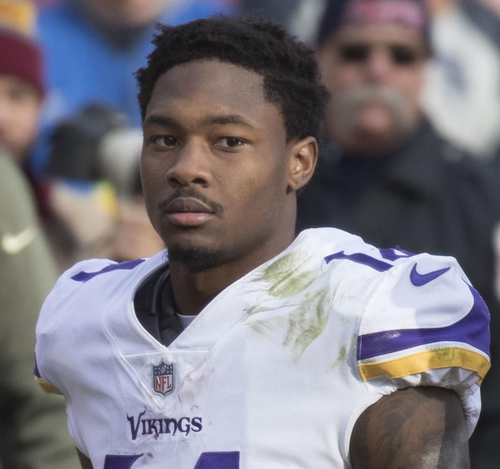 Vikings at Redskins 11/12/17